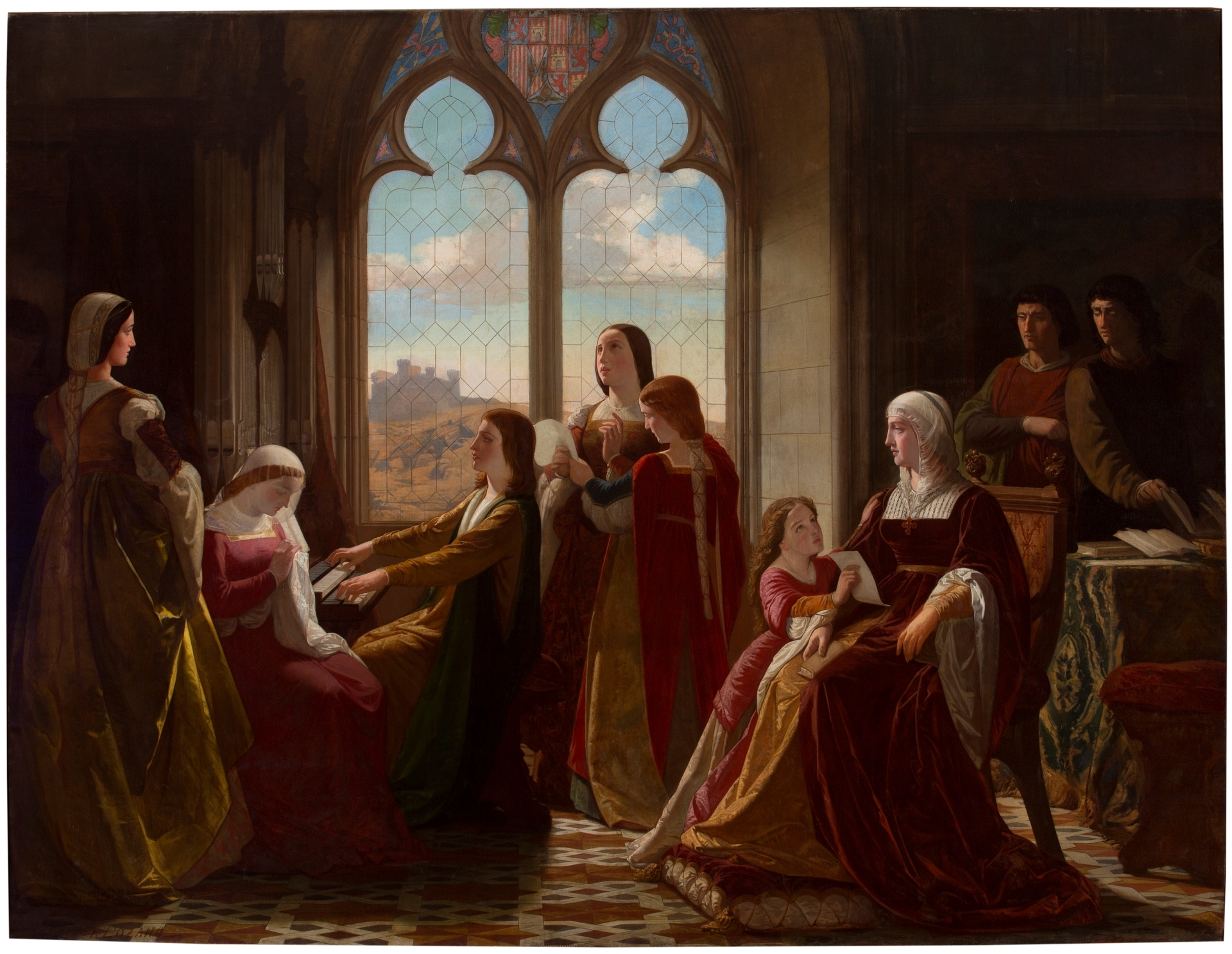 La obra representa a la reina Isabel la Católica presidiendo la educación de sus hijos.